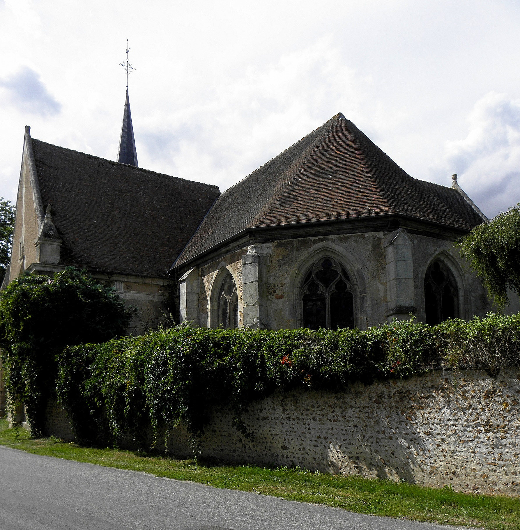 Église Saint-Sulpice de Bérou-la-Mulotière (28). Chevet.